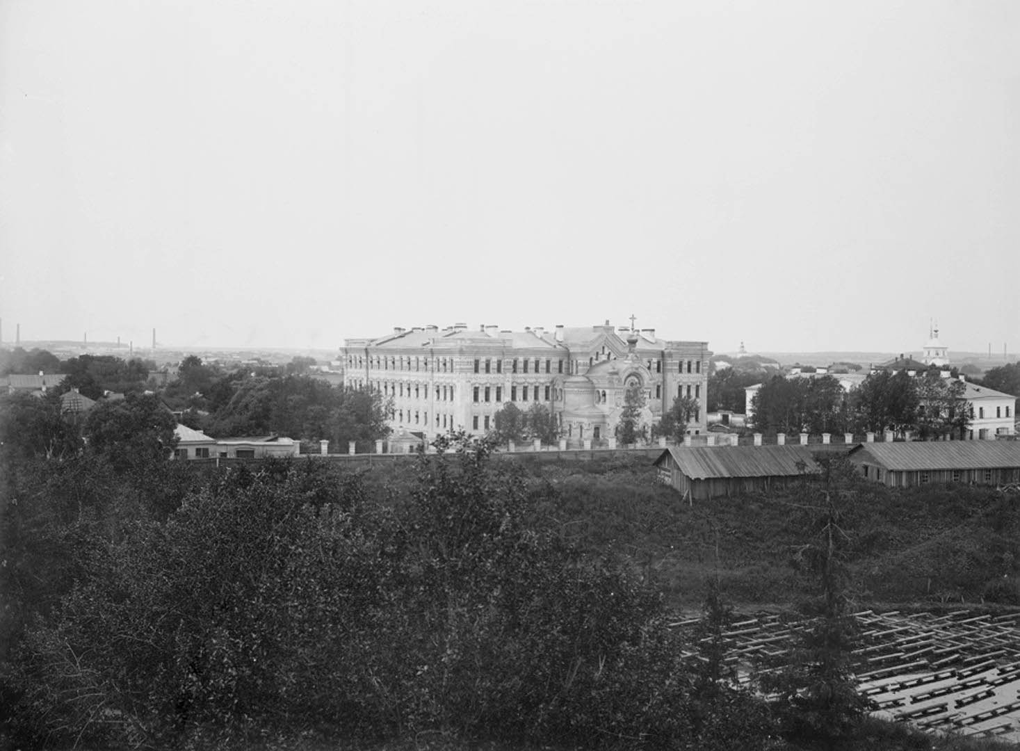 Здание Тверской духовной семинарии Место хранения: Архив аудиовизуальной информации Нижегородской области